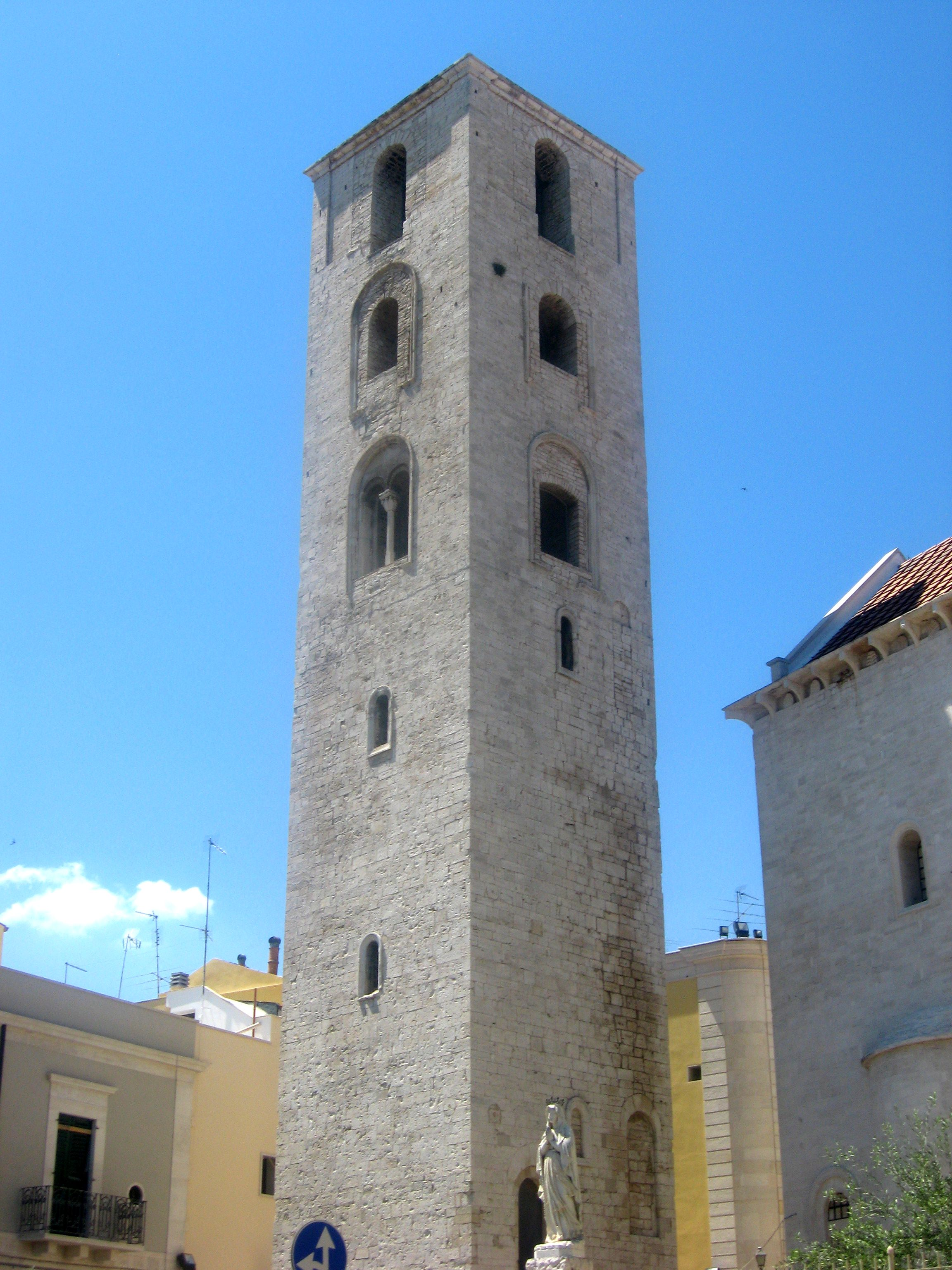 Campanile della Cattedrale di Ruvo di Puglia